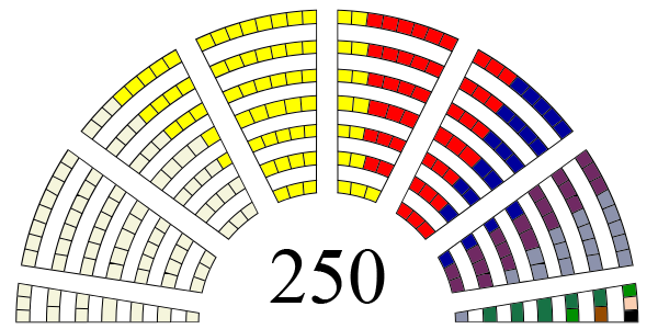 Parlamentarni izbori 2012 - raspodela mandata